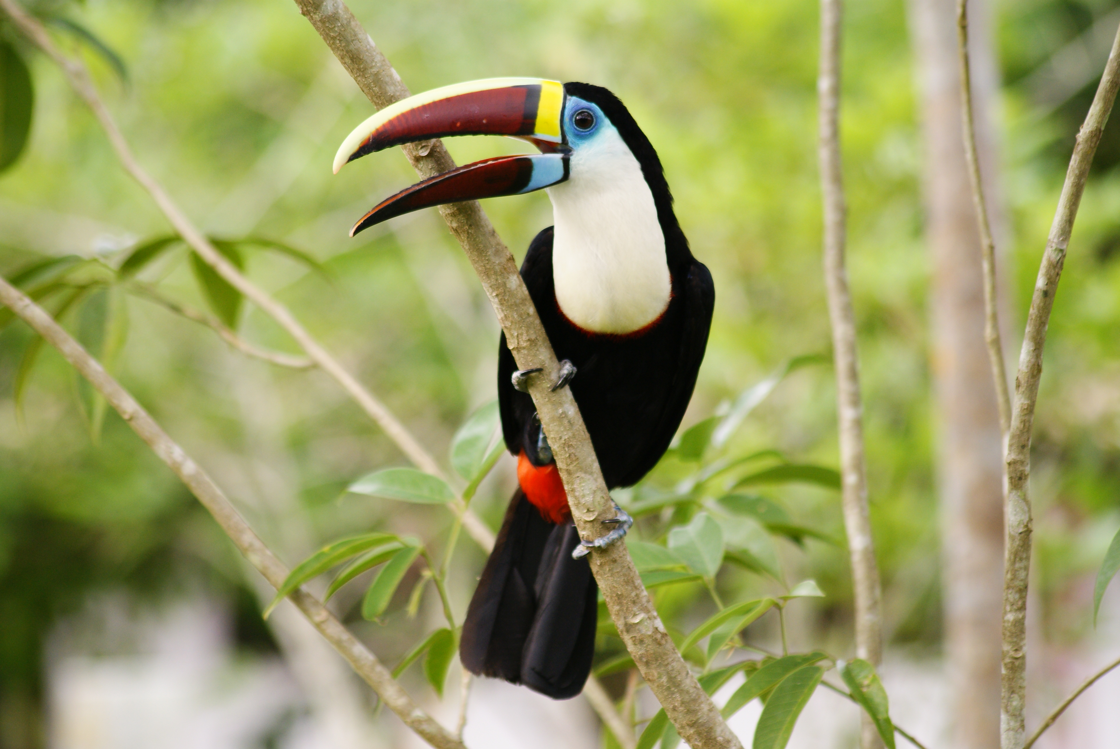 Tucano resgatado do cativeiro vivendo em liberdade no CPMMA, Balbina, Amazonas